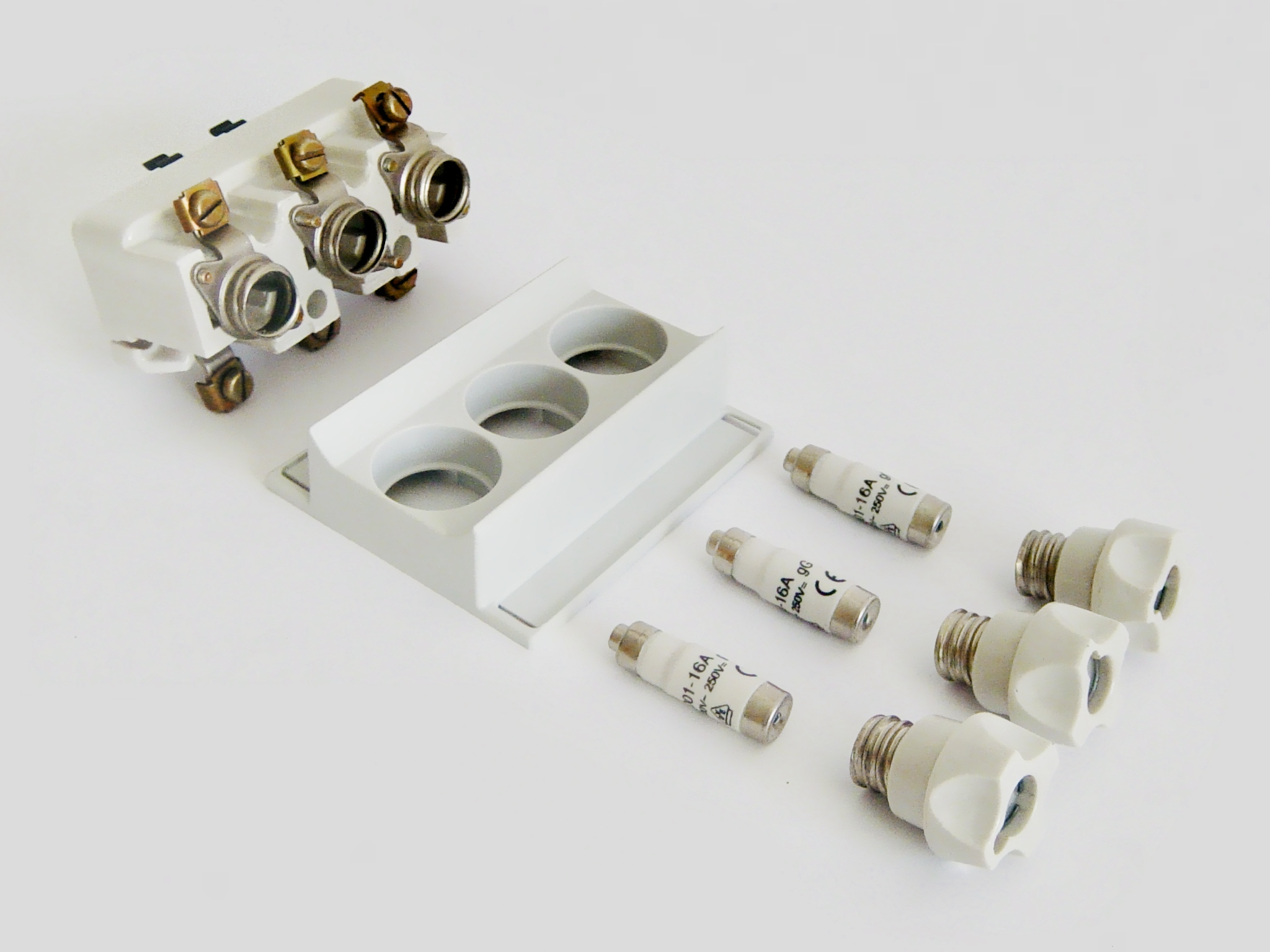 3-poliges Sicherungselement, 3x 16Ampere Neozed Sicherungen, Schraubverschlüsse